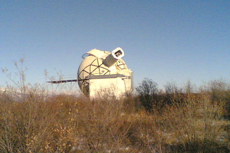 Внезатменный солнечный коронограф системы Никольского, расположенный в Саянской солнечной обсерватории ИСЗФ СО РАН (Россия, р.Бурятия)